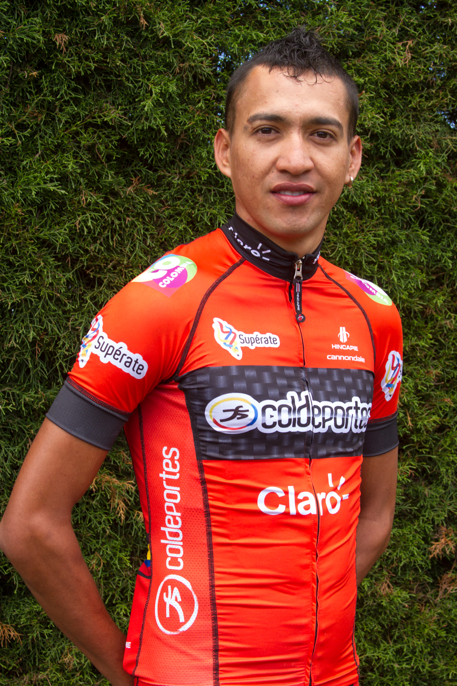 Presentación del equipo que participará en la Vuelta a Colombia Supérate - Intercolegiados 2013Foto: Coldeportes Claro (Lina Lopera)